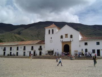 Villa de leyva 01